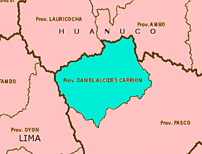 Limites Geográficos de la Provincia Daniel Alcides Carrión, Pasco. Modificación del Original